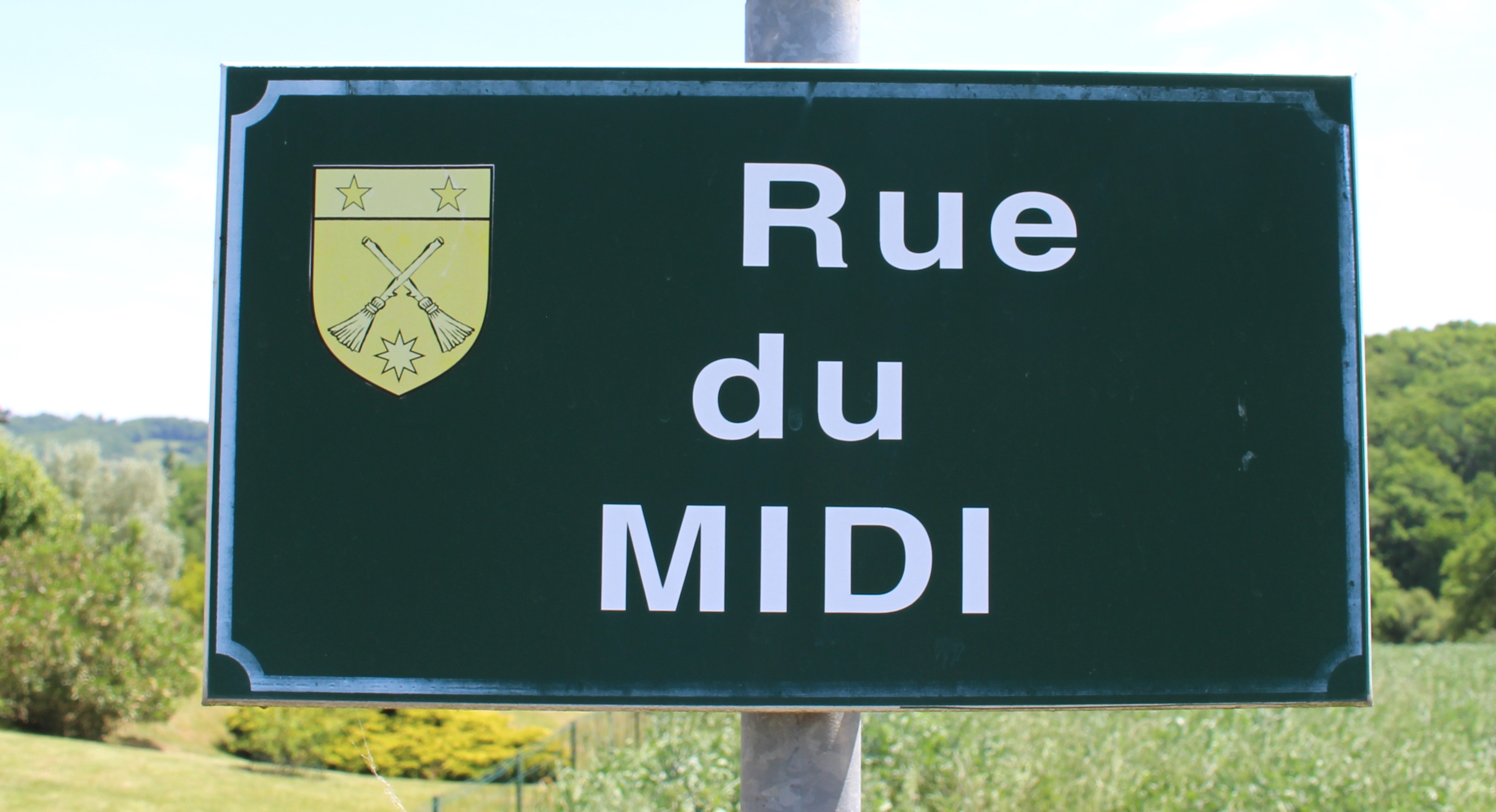 Rue du village de Louit (Hautes-Pyrénées)